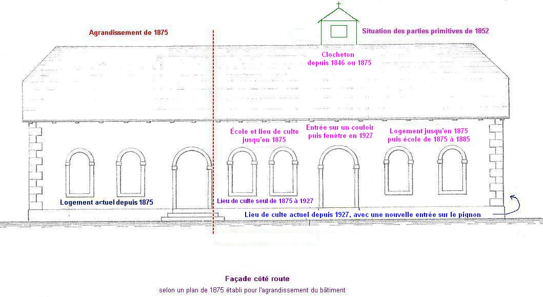 Diverses utilisations de ce temple d'après un plan de 1875.